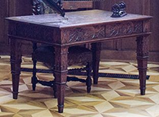 Birou sculptat cu efigii de domnitori și Decebal și Traian. Biroul a participat la Expoziția artiștilor în viață din anul 1870 unde a câștigat Medalia de clasa a II-a. Astăzi, biroul se află la Muzeul Aman din București.